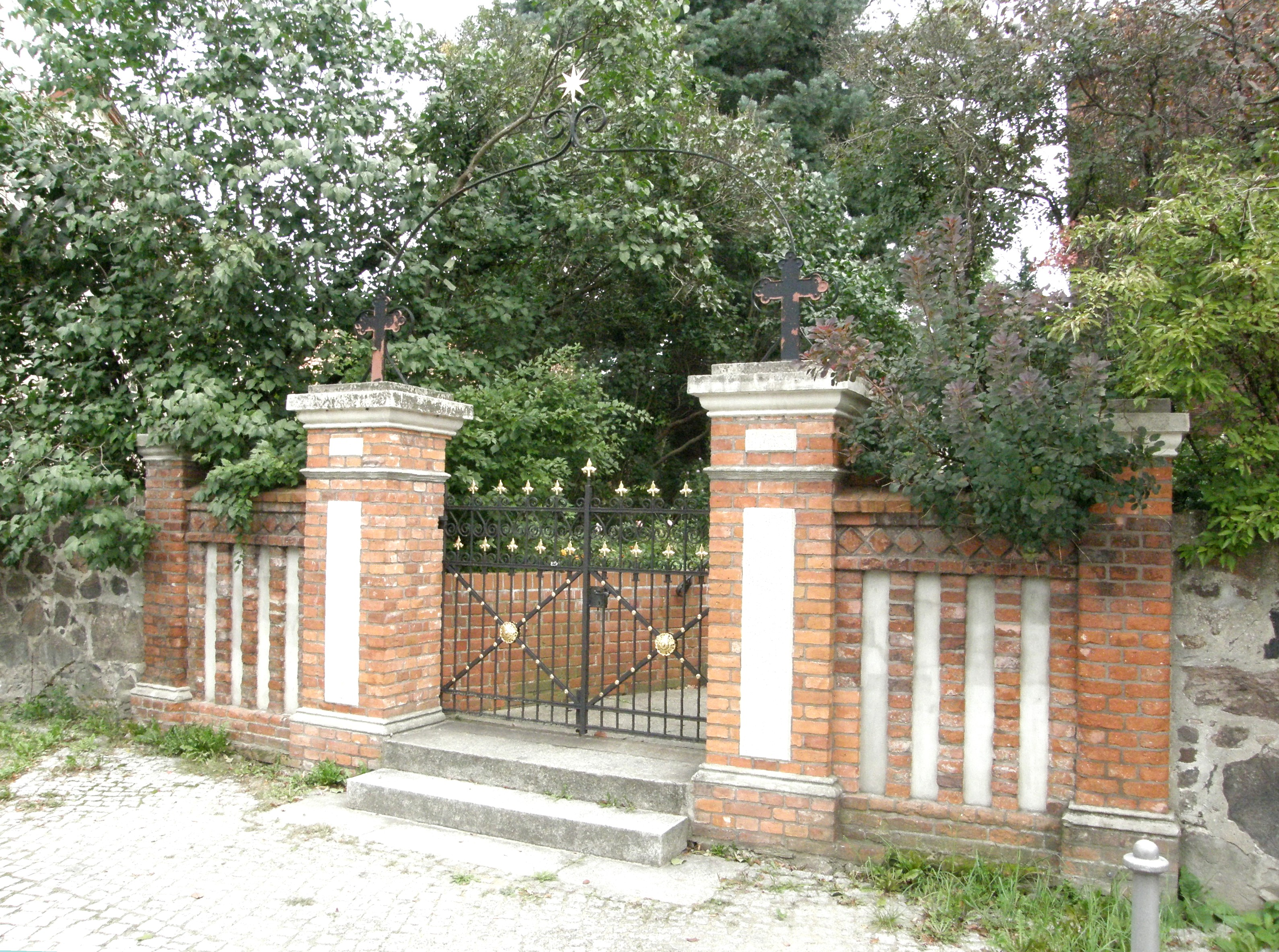 Berlin-Kaulsdorf, Dorfkirche in der Dorfstraße: Hochzeitspforte